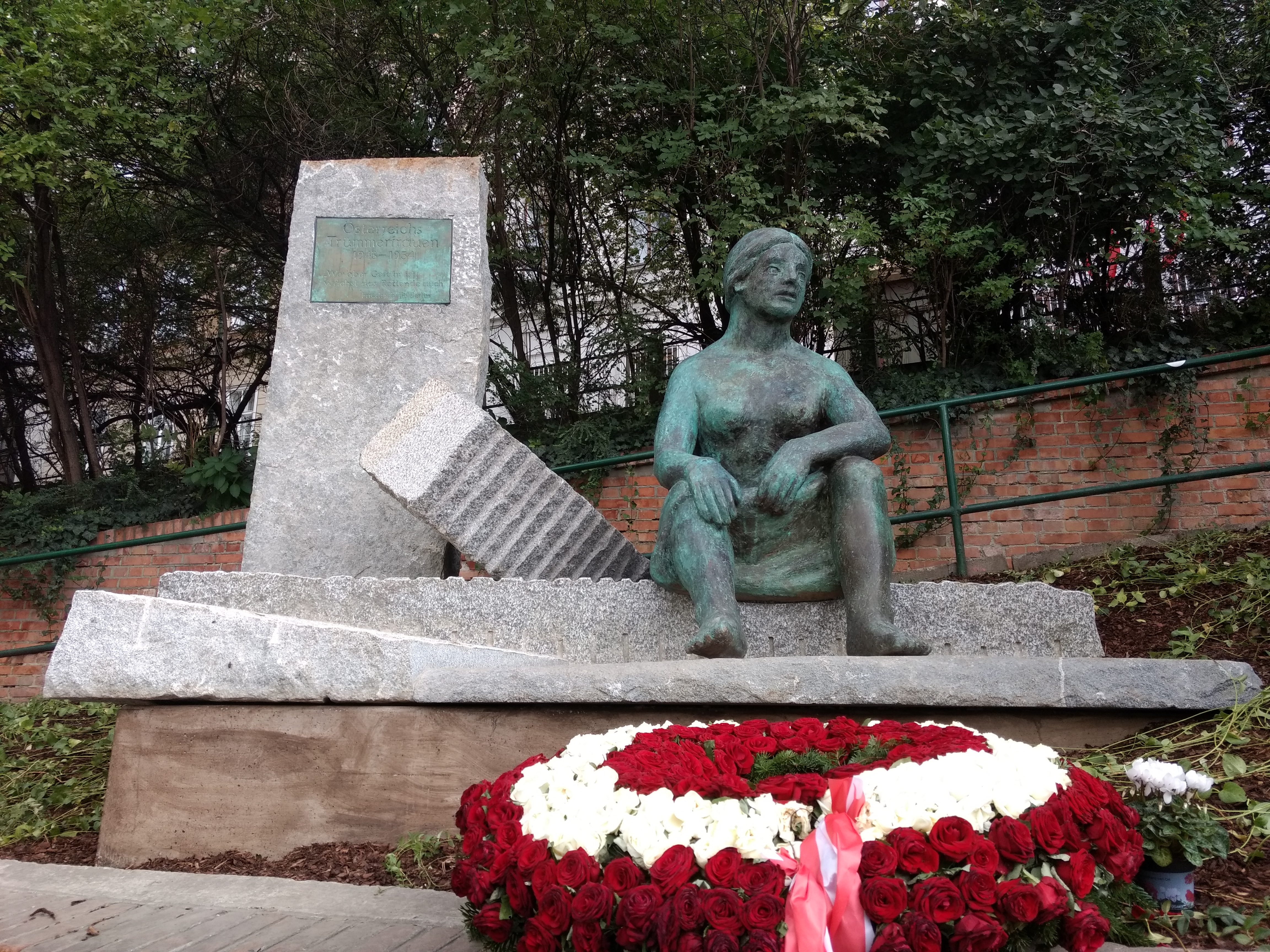 Denkmal für die Trümmerfrauen nach dem 2. Weltkrieg auf der Mölkerbastei, 1010 Wien